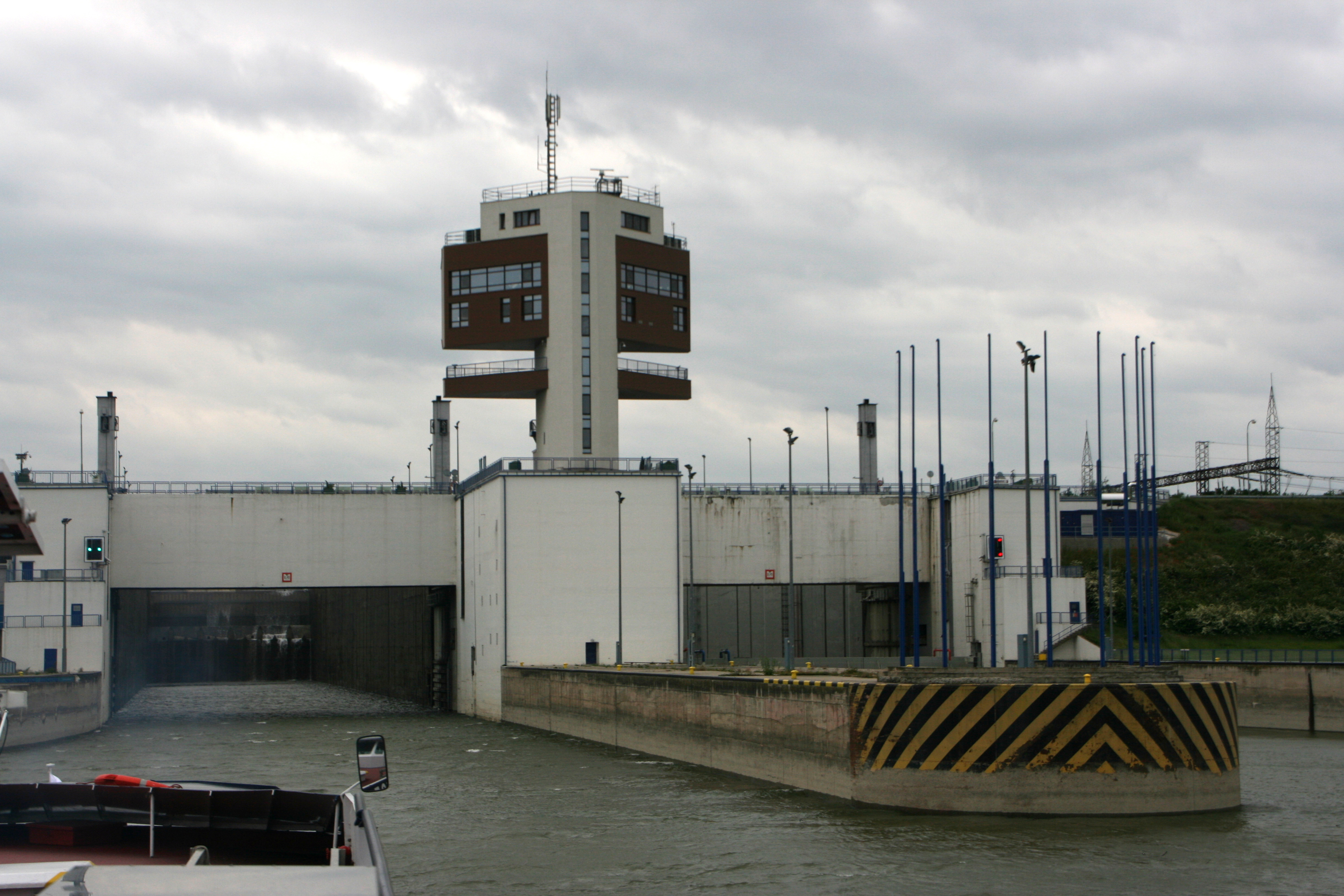 Donau-Kraftwerk Gabčíkovo Schleuseneinfahrt von unten